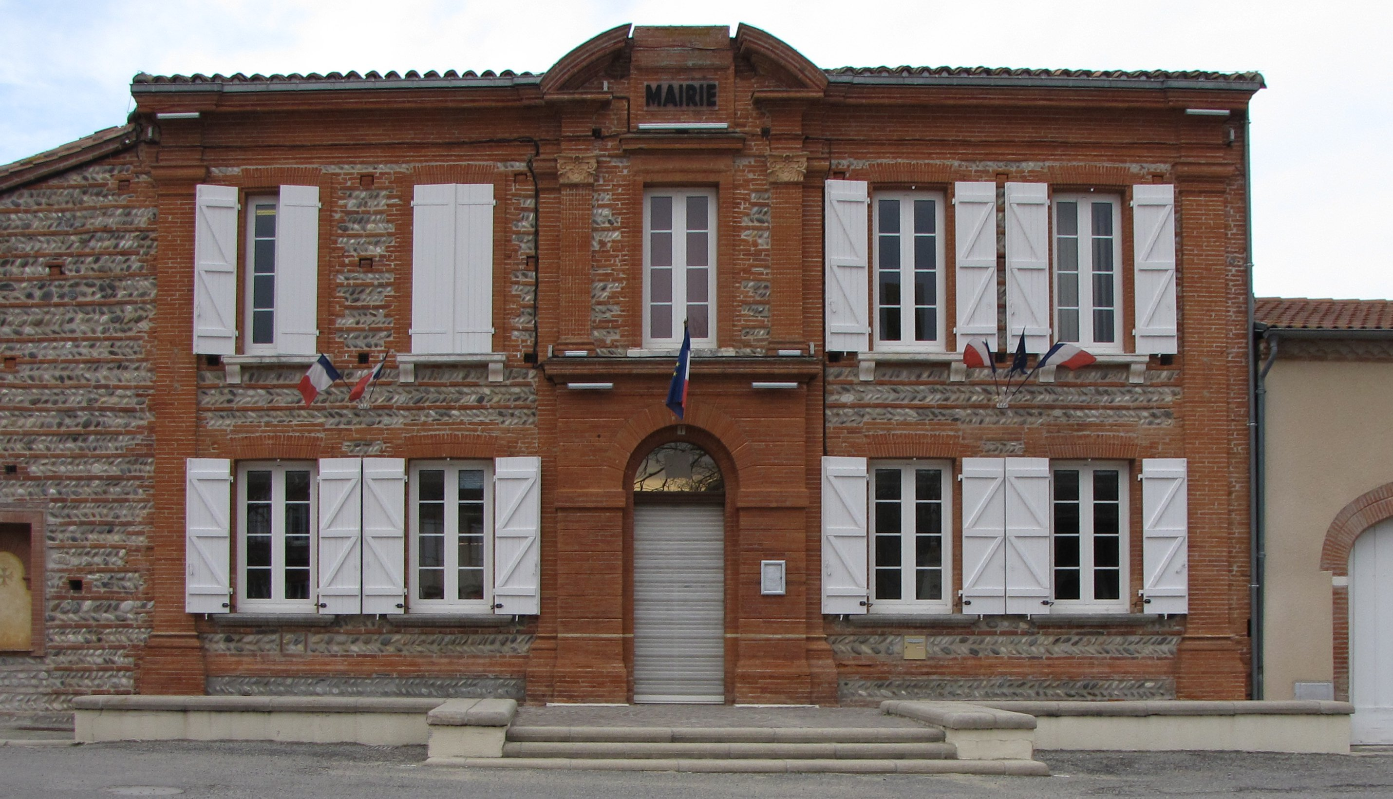 Mairie du Fauga